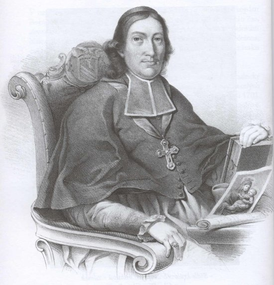 královéhradecký biskup Tobiáš Jan Becker